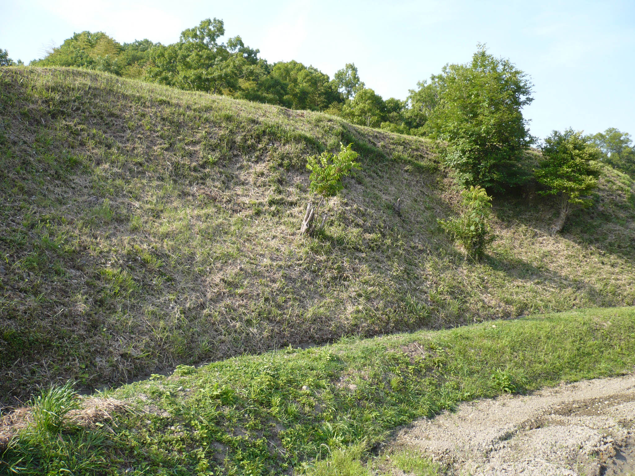 福井城